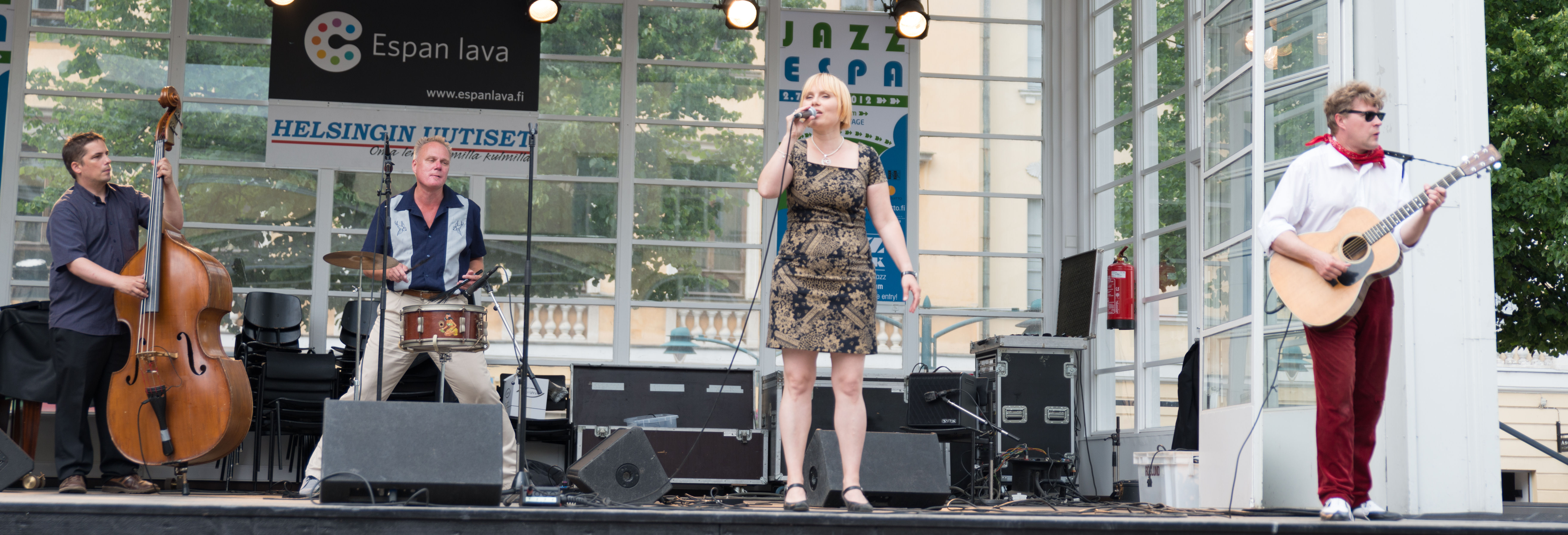 Cat Lee & Co suomalainen yhtye